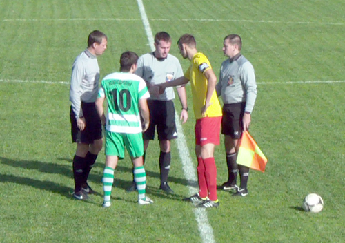 Капитаны команд "Знамя" (Ногинск) и "Олимп-СКОПА" (Железнодорожный), а также бригада арбитров перед началом ответного финального матча Кубка России среди КФК, зона "Московская область"